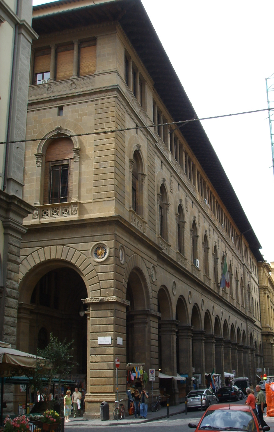 Palazzo delle poste, firenze